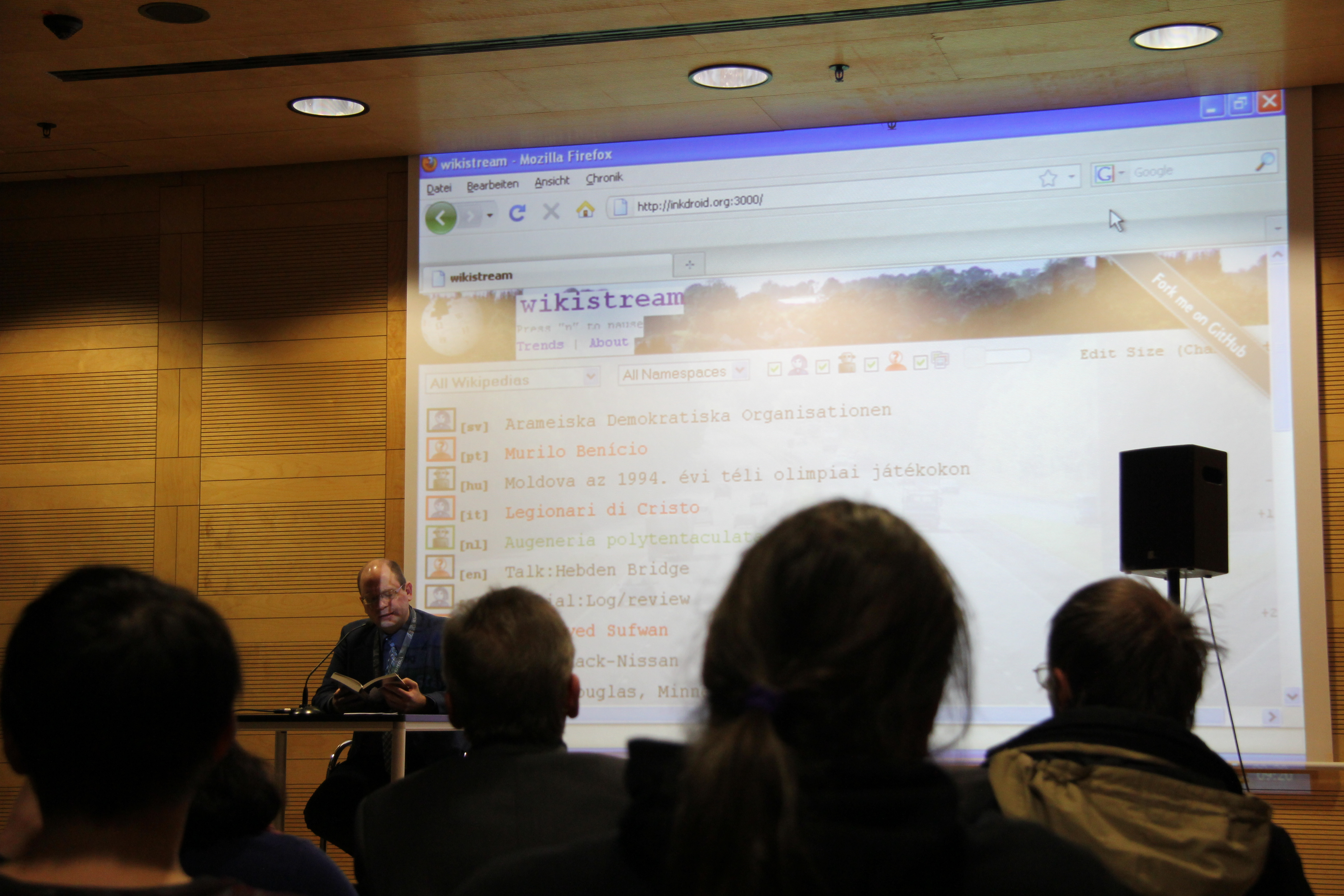 Alles über Wikipedia. Lesung am 15. Dezember 2011 in der Stadt- und Landesbibliothek Dortmund.